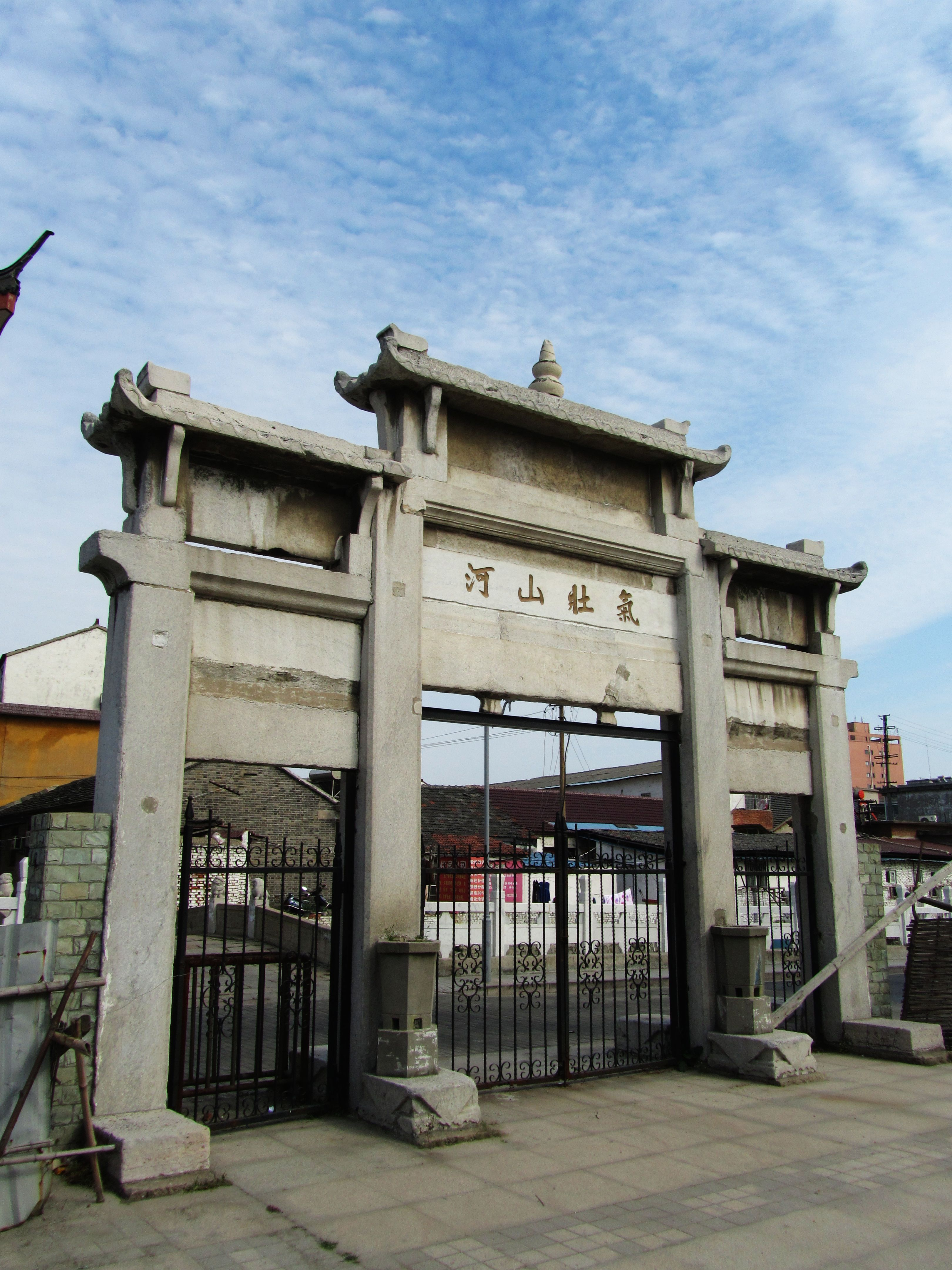 泰州泰山公园内的柱史坊。